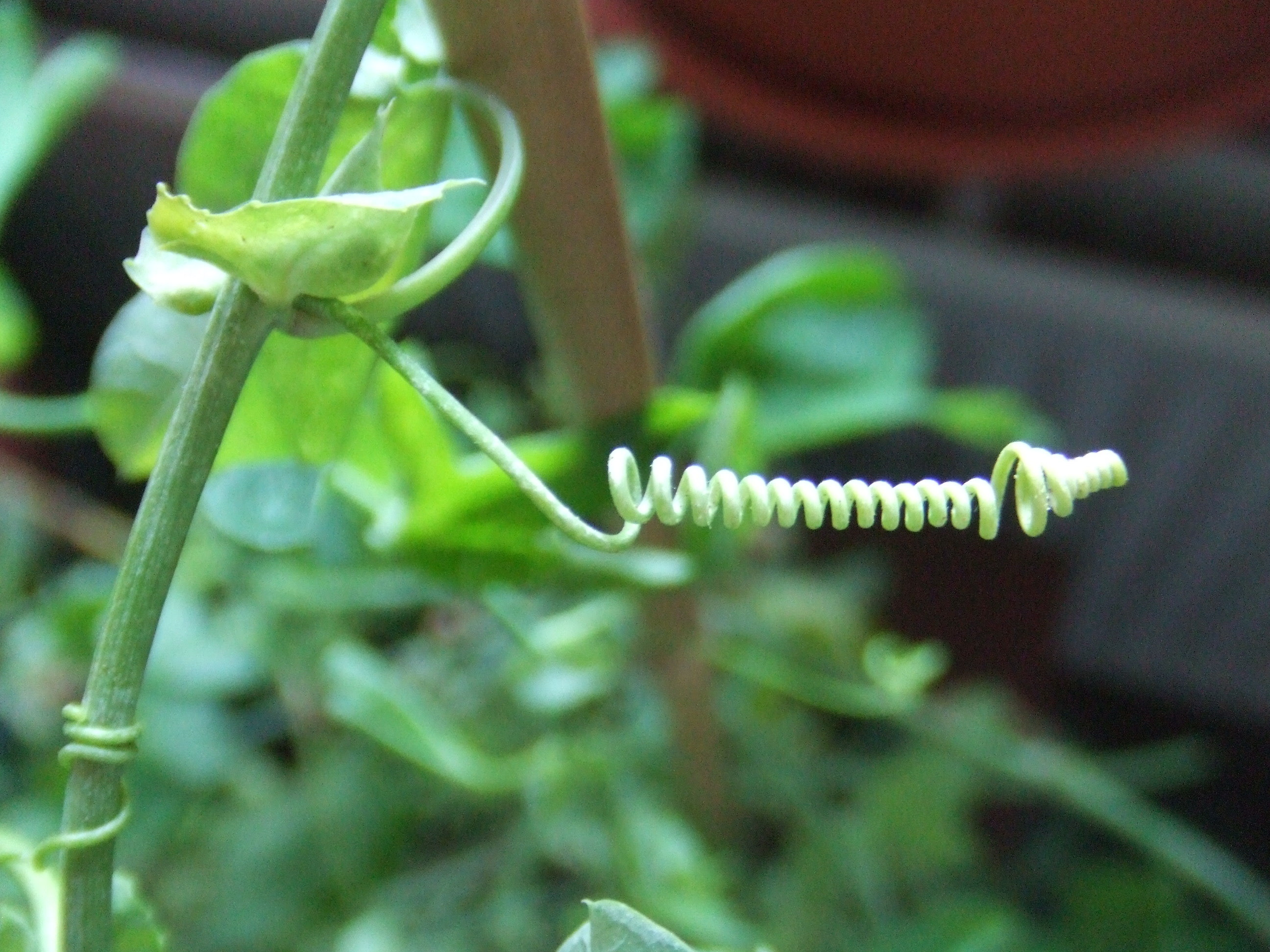 Rank van Passiflora umbilicata, eigen kweek